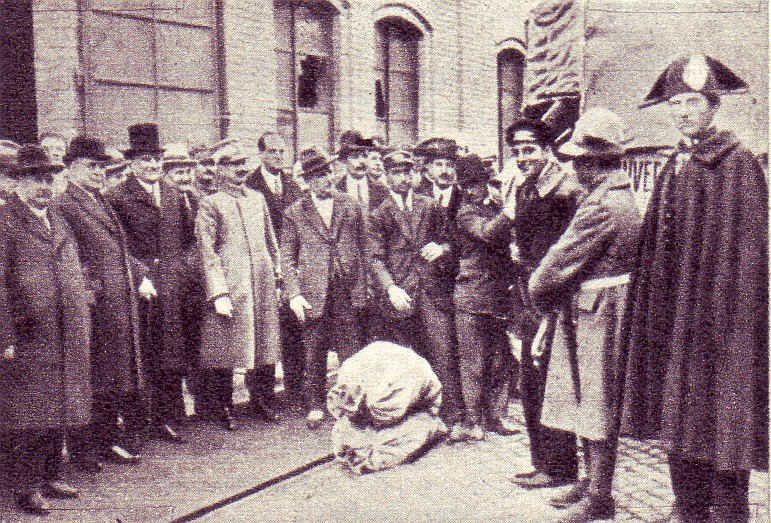 Lotta all'inflazione. Alla presenza del ministro Alberto De Stefani vengono scaricati i sacchi pieni di banconote destinati alla distruzione, Roma 30 marzo 1925